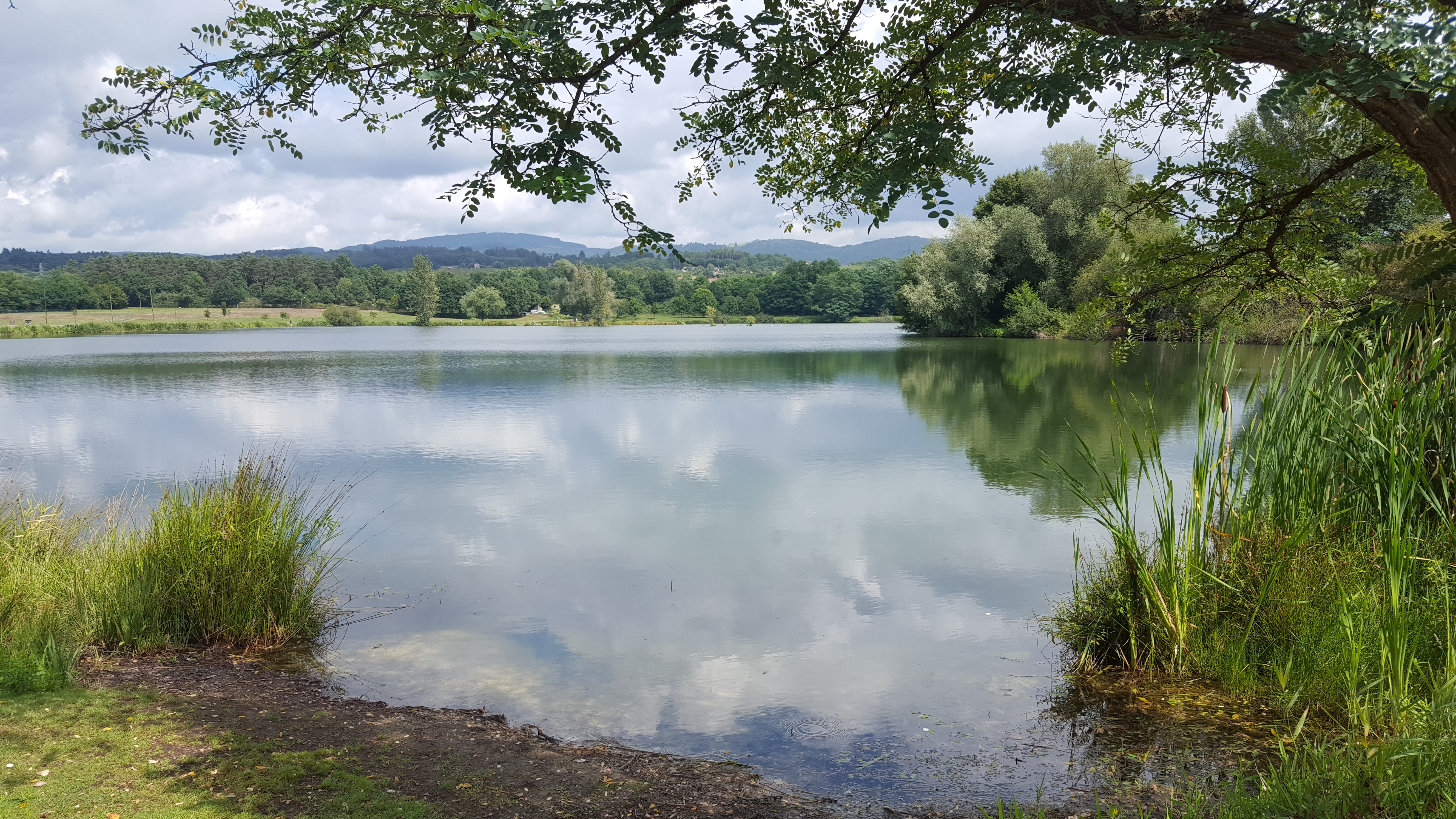 Base de loisirs ILOA Les Rives de Thiers